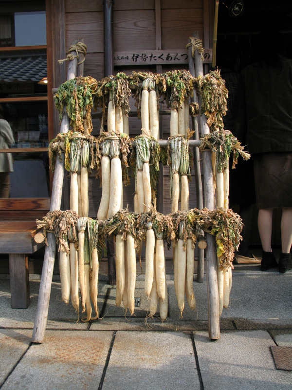 Radish: Okage-yokochou